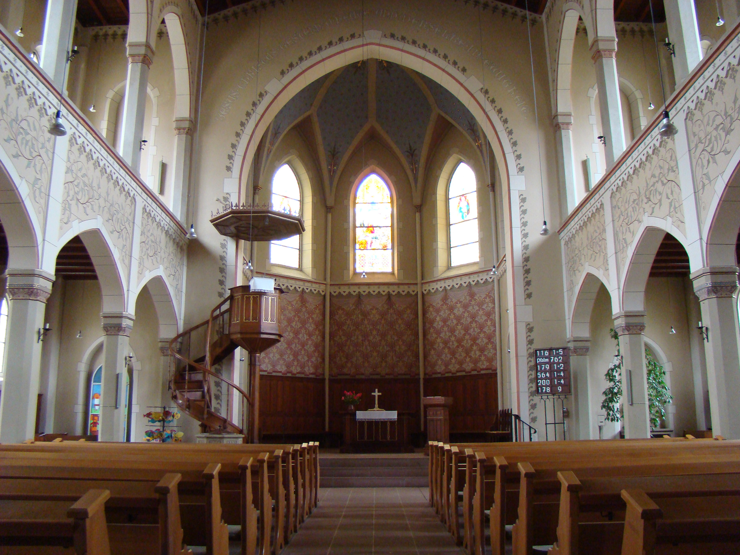 Evang. Kirche in Meckesheim